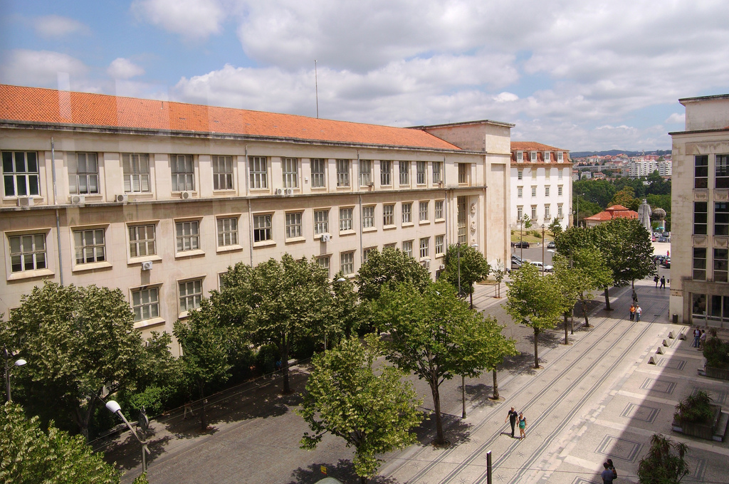 Faculdade de medicina (polo 1) da Universidade de Coimbra. Vista do departamento de física.